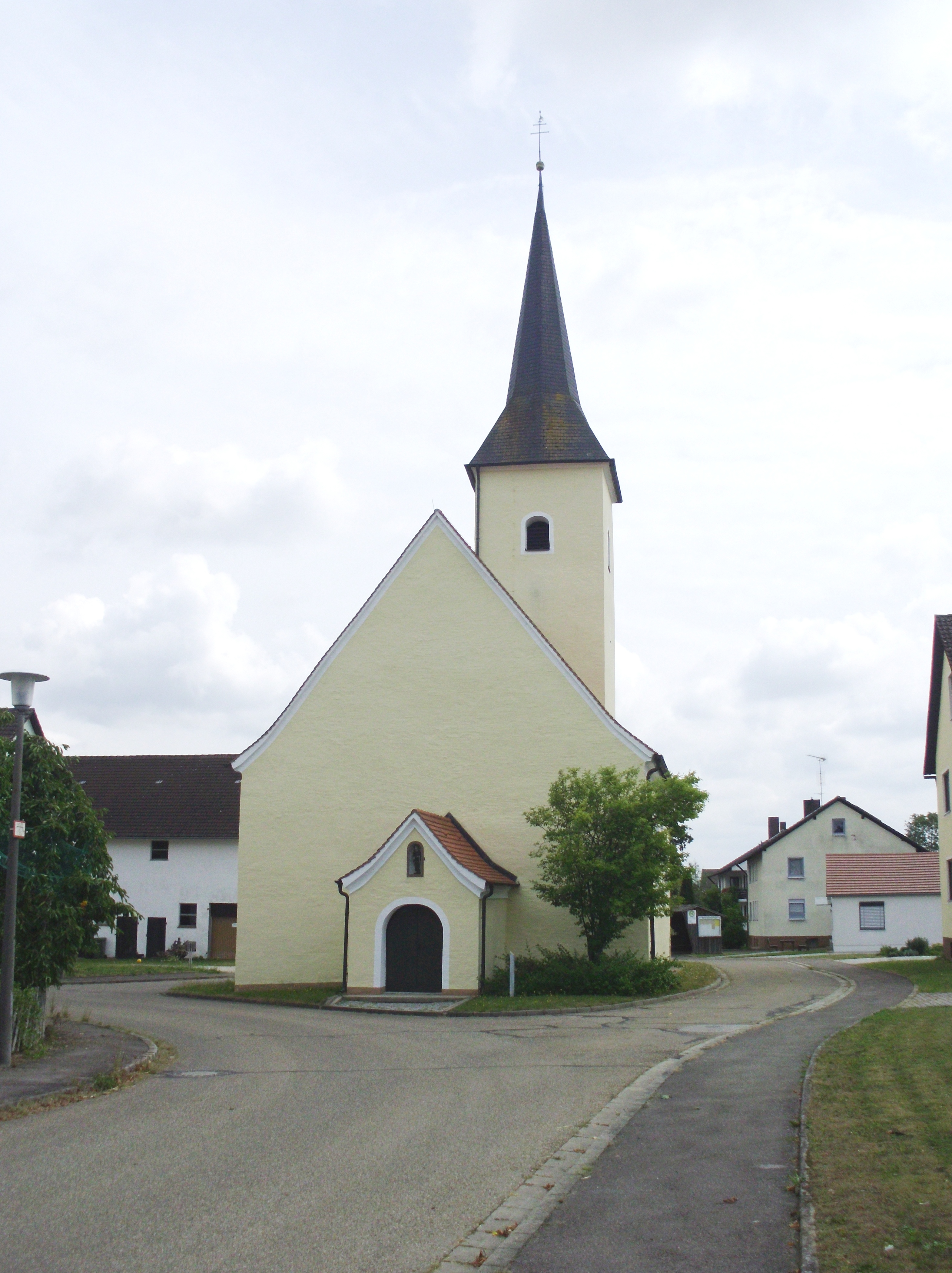 Häusern, Gemeindeteil von Hilpoltstein im mittelfränkischen Landkreis Roth, Katholische Kirche St. Leonhard